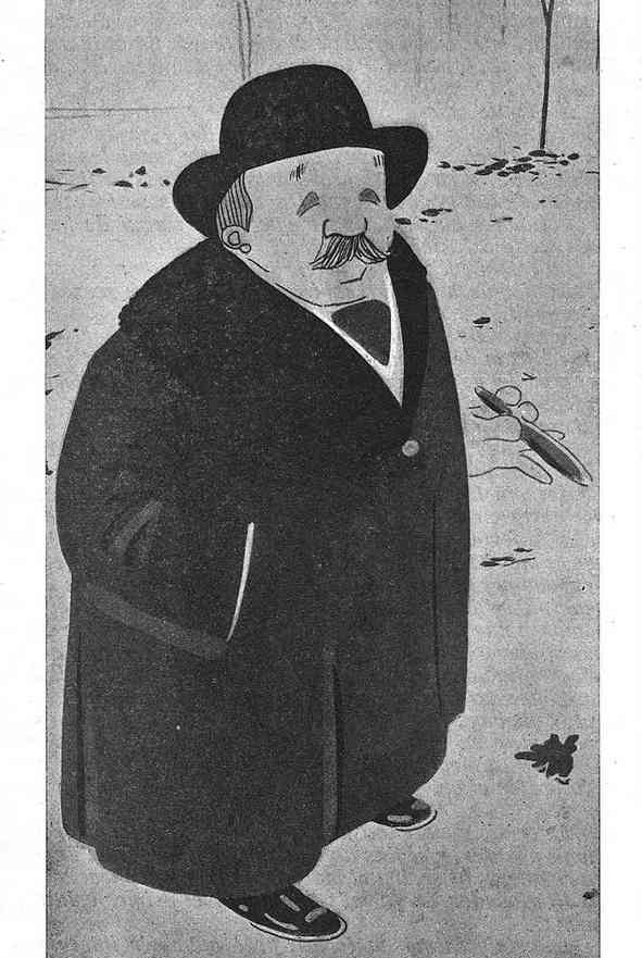 Exposició de caricatures d'en Bagaria.